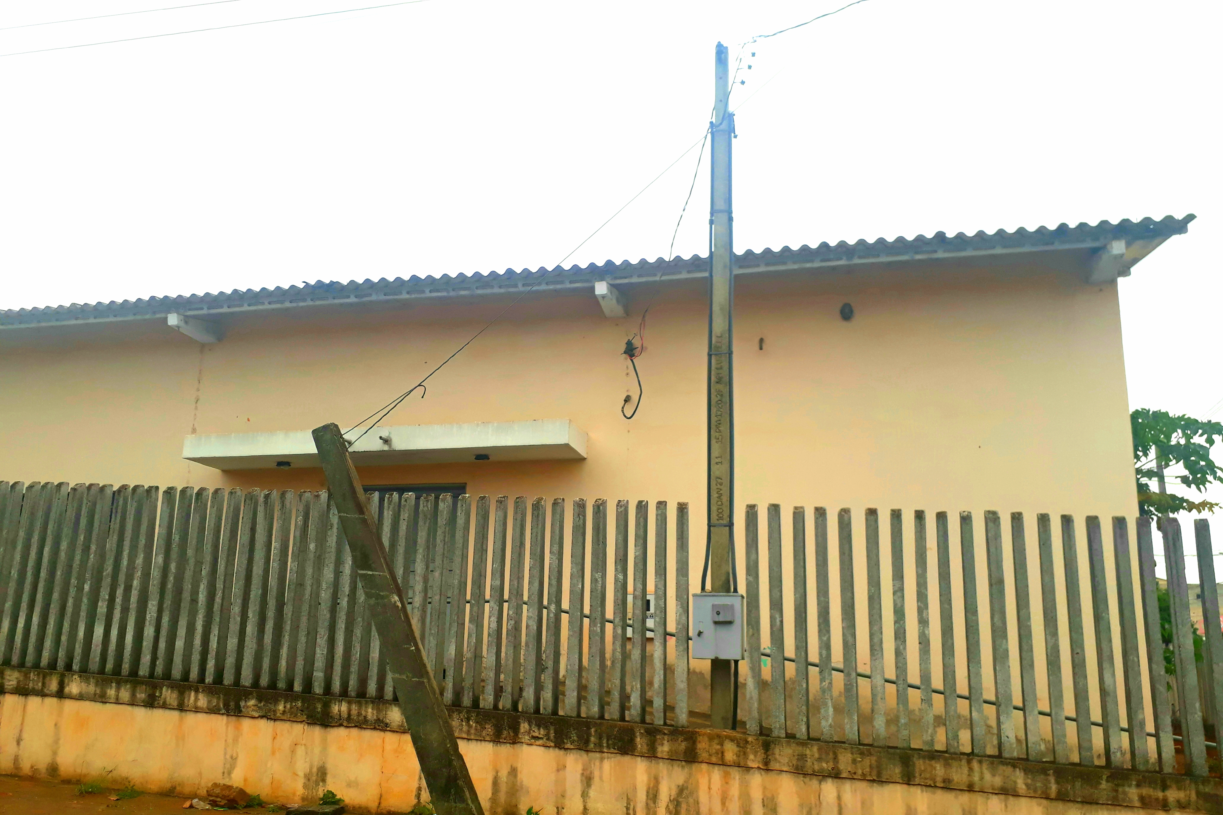 Centro comunitário do bairro Socomim, em Telêmaco Borba, no Paraná.